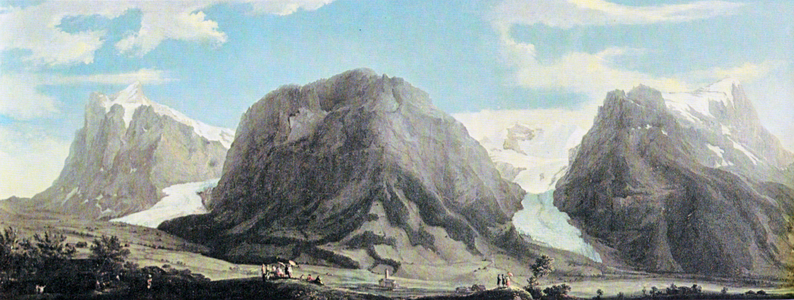 Oberer und Unterer Grindelwaldgletscher mit Wetterhorn, Mettenberg und Eiger 1774. Öl auf Leinwand, 82 x 226 cm. Aargauer Kunsthaus, Aarau.